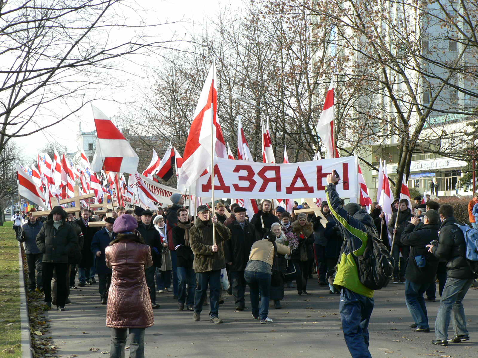 Беларуская (тарашкевіца): Hramadzkija dziady 2009h. Pachod u bok Kurapataŭ.